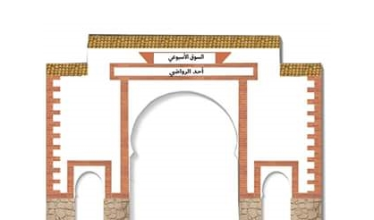 Bandera de rouadi